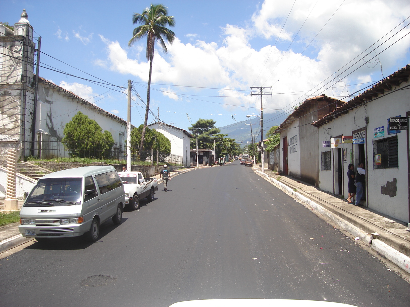 Tramo ubicado en la 6º Avenida Norte, Barrio Analco. Un Paisaje típico de la ciudad.